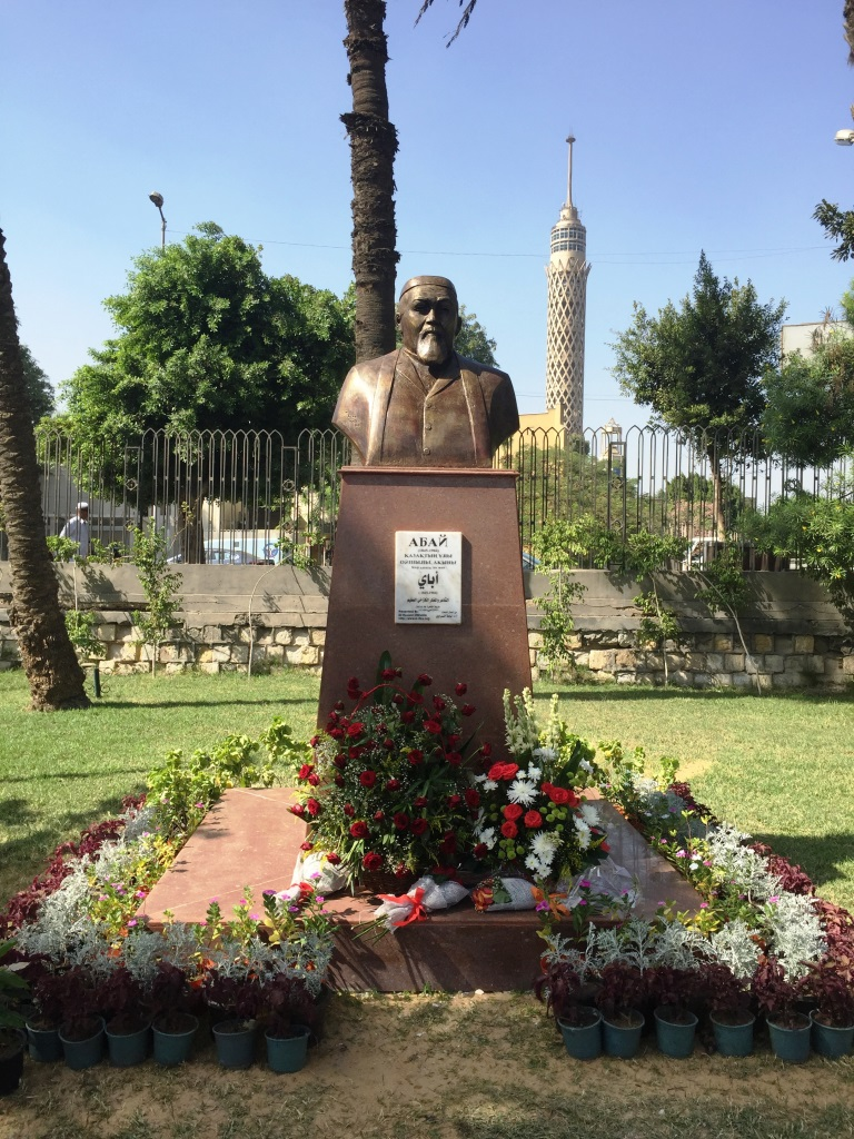 Бюст Абая, установленный в одном из красивейших центральных парков Каира - парке «Свободы и дружбы» при поддержке Посольства Казахстана в Египте (13 октября 2016 г.)